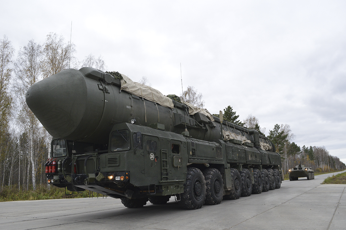 Командно-штабное учение с новосибирским соединением Ракетных войск стратегического назначения.